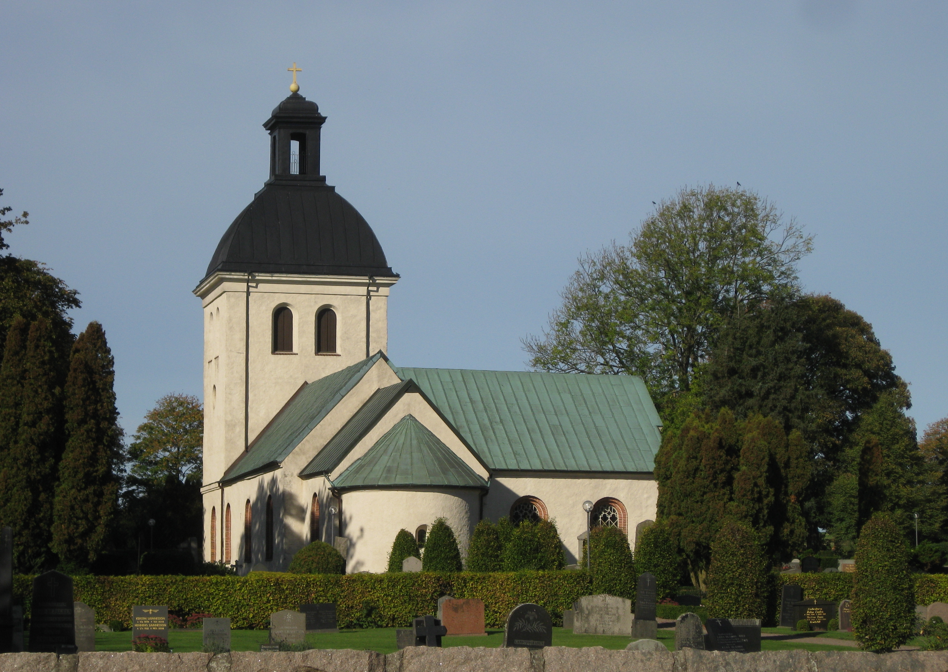 Norrvidinge kyrka